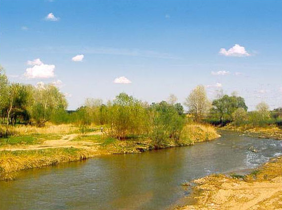 Summary Podkumok River near Georgievsk. Photo by S.A. Sverdlov.